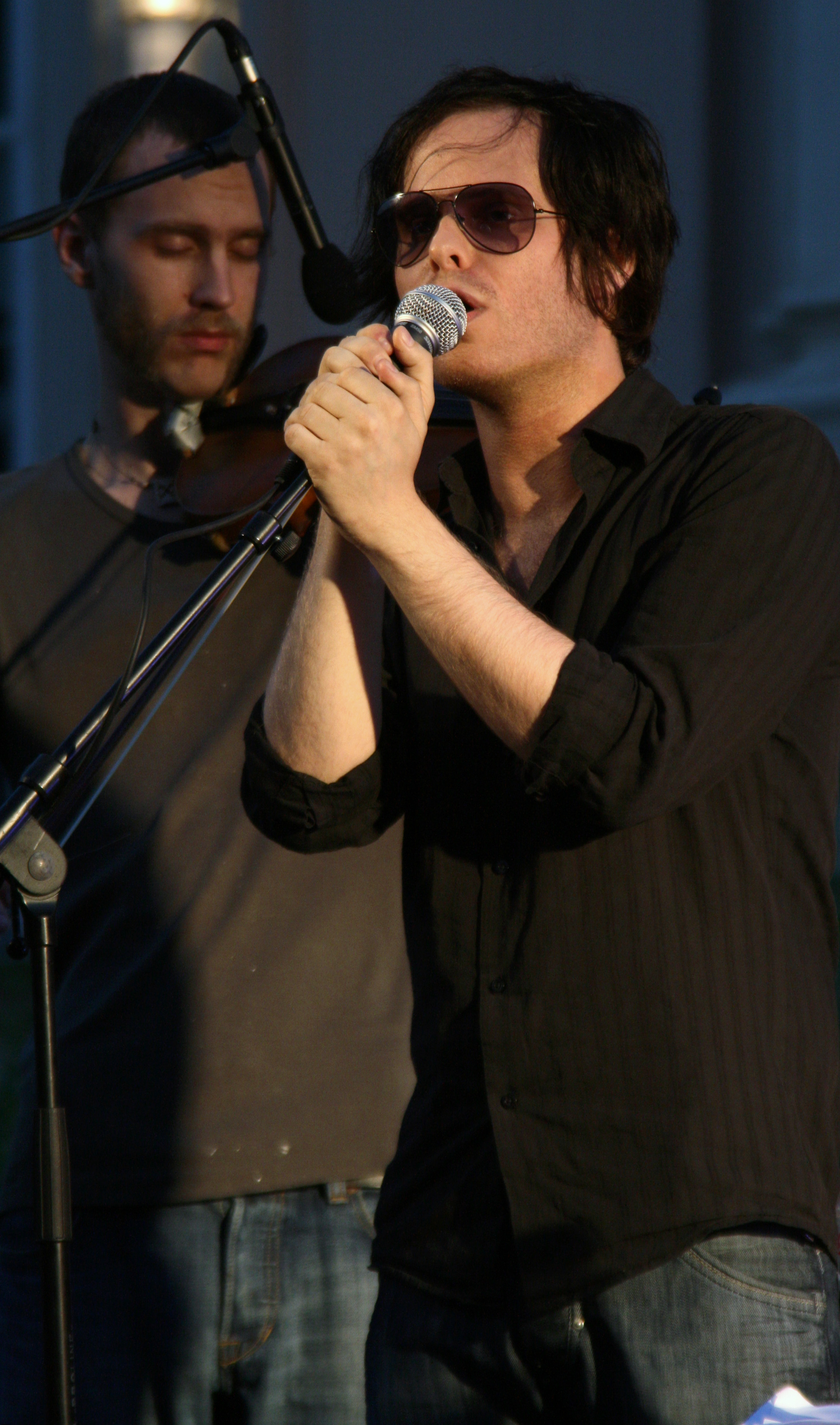 David Pfister - Neigungsgruppe Sex, Gewalt und Gute Laune